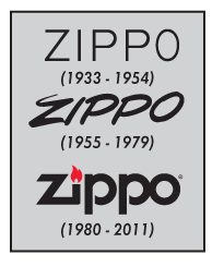 Les 3 changements de la marque Zippo au cours de l'hisoire